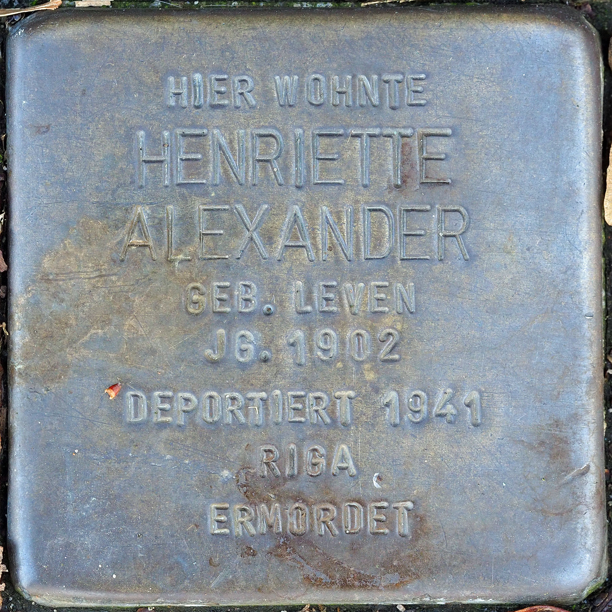 Stolpersteine MG: Alexander, Henriette